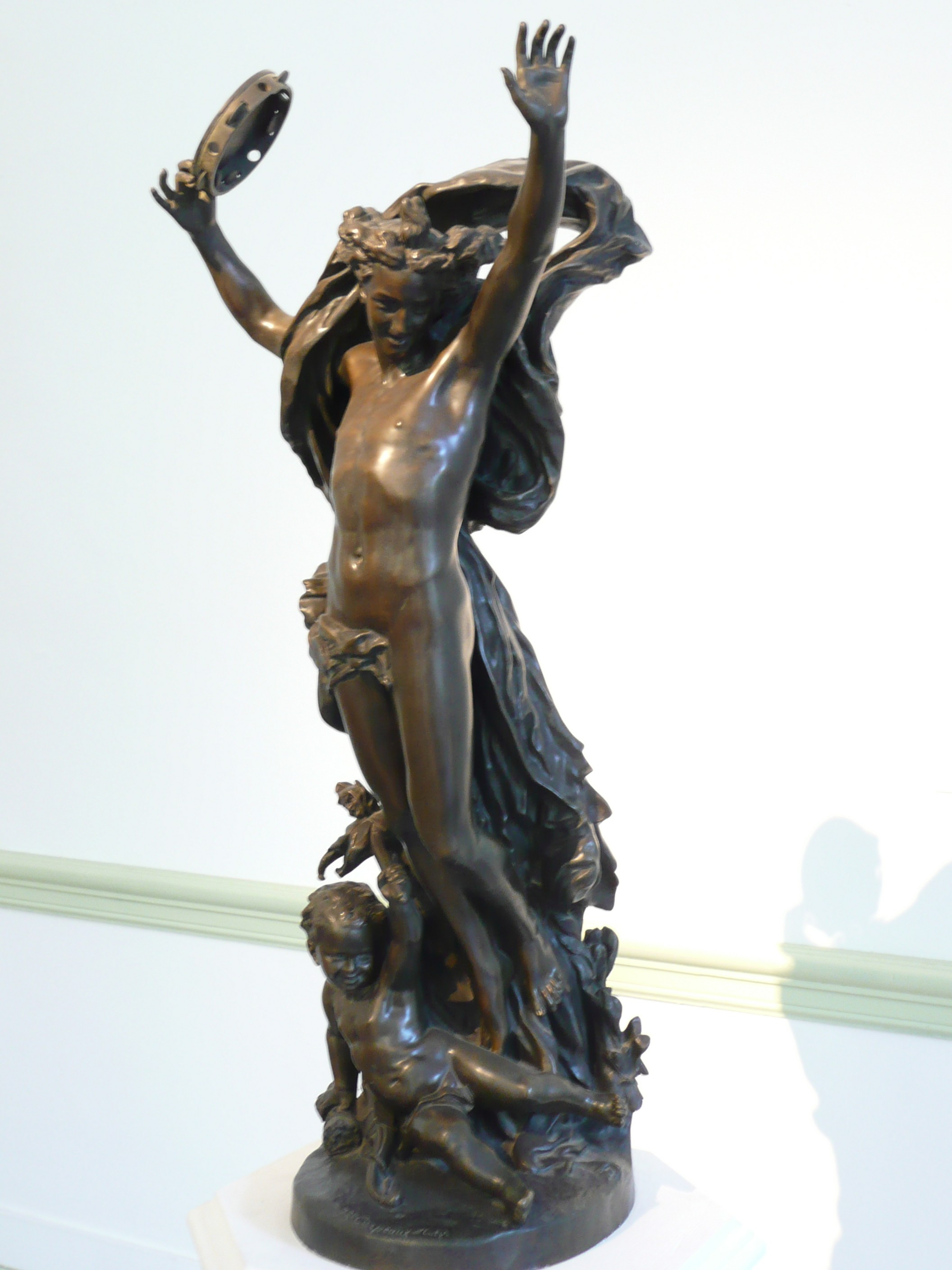 Au musée des Beaux-Arts Jules Chéret de Nice (Alpes-Maritimes), Génie de la Danse avec l'Amour à la folie, bronze de 1872.